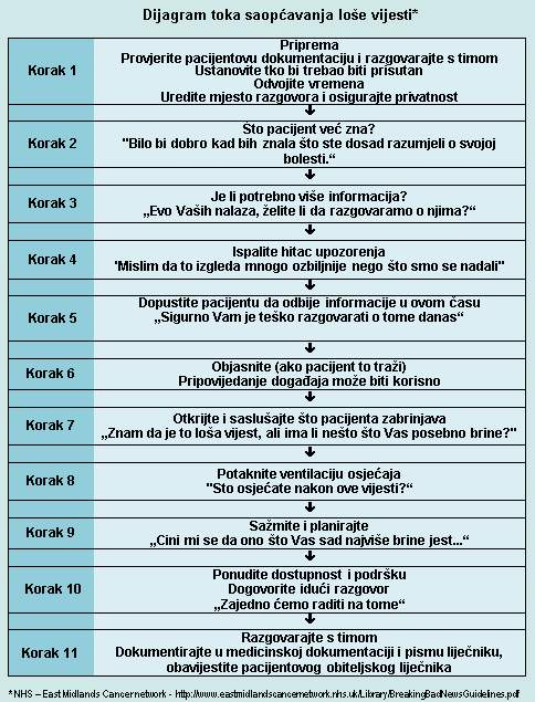 Srpskohrvatski / српскохрватски: NHS - East Midlands Cancer Network: Dijagram toka saopćavanja loše vijesti